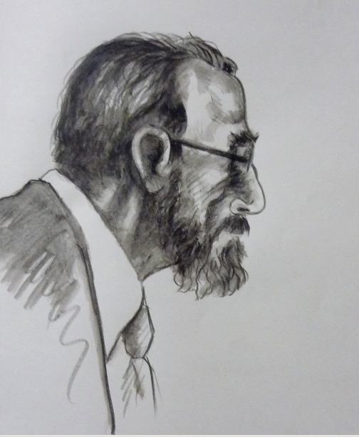 Hugo Martinez Gonzalez Watercolor by Fabio Barrera Tellez